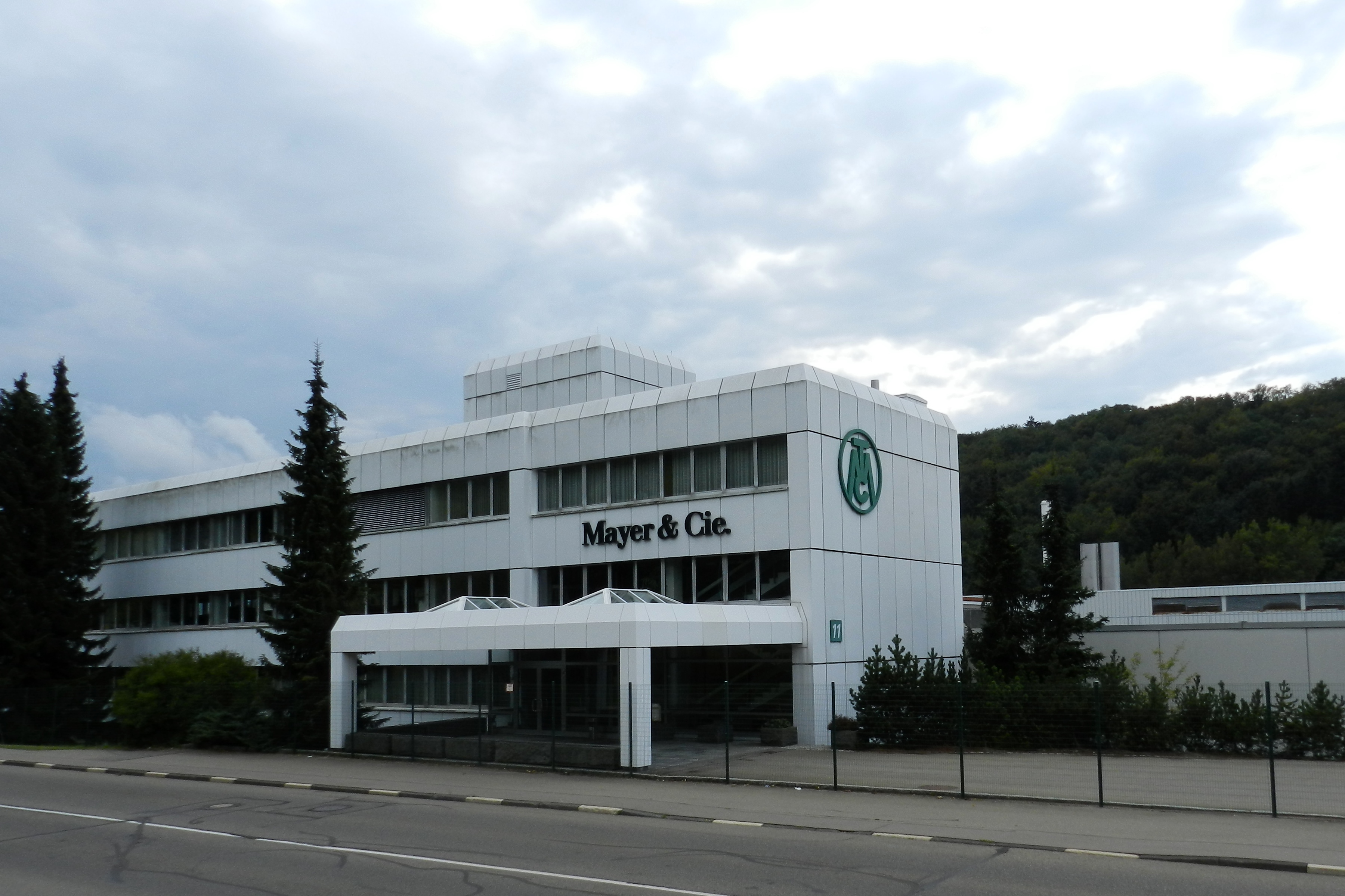 Albstadt, Mayer & Cie, Weltmarktführer in der Herstellung von Rundstrickmaschinen (2011)